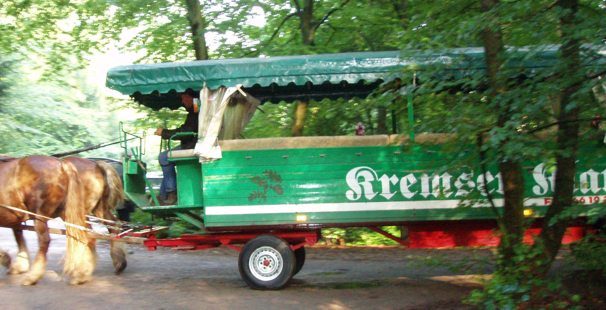 ein Kremser (Bürgerpark oder Bürgerweide Bremen)